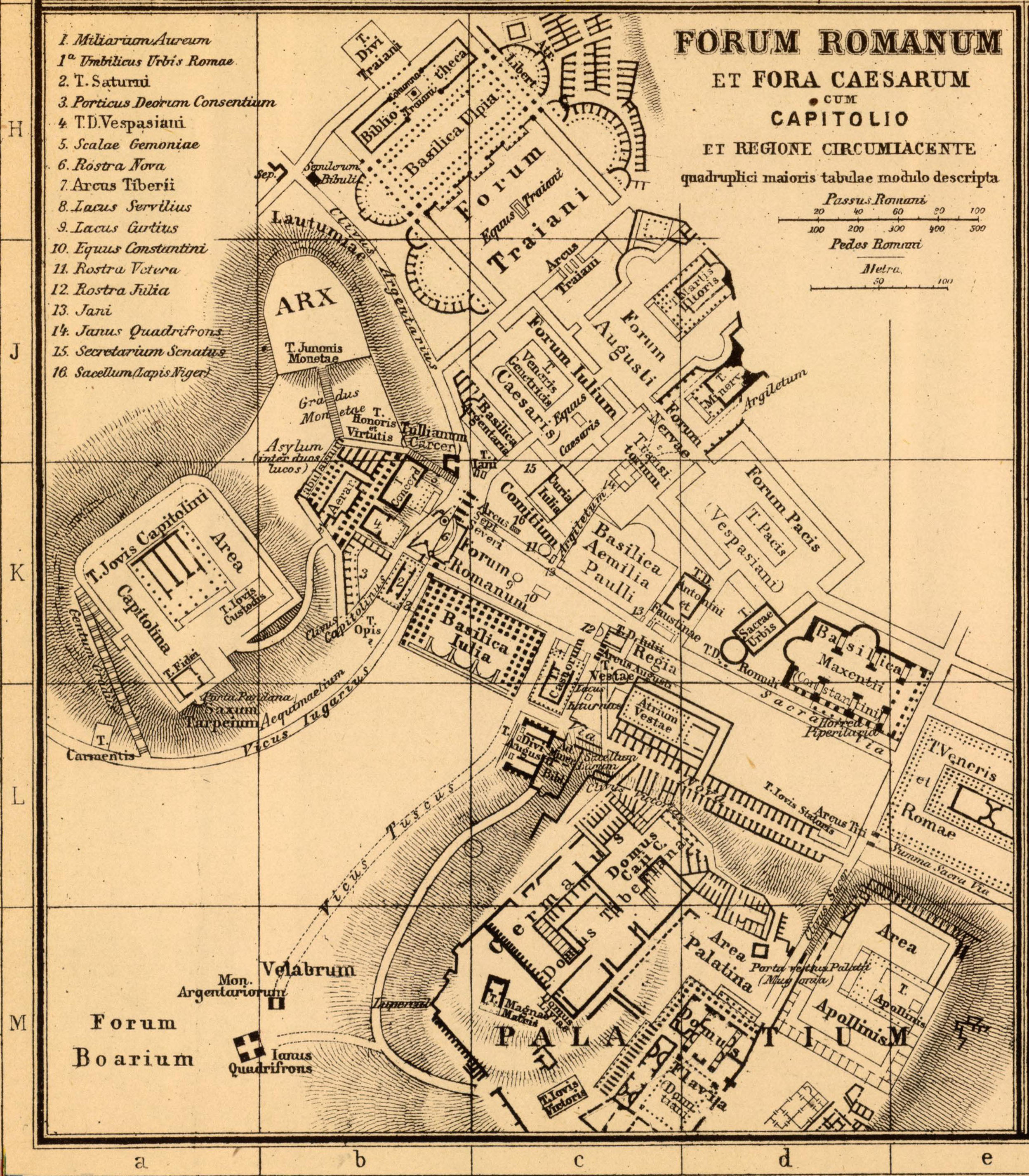 Forum Romanum et fora Caesarum cum Capitolio et regione circumiacente quadruplici maioris tabulae modulo descripta